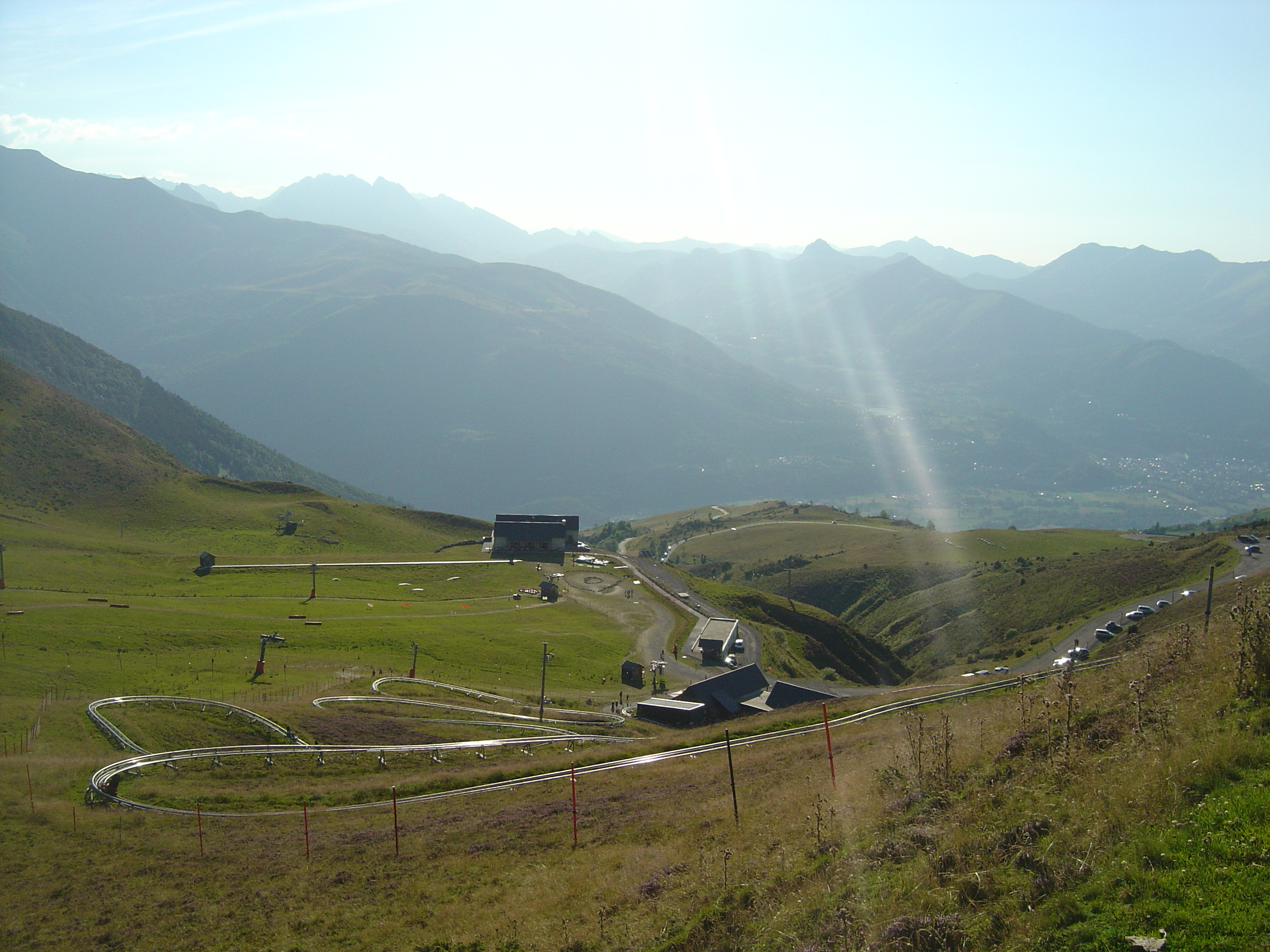 Plus bas la station d'Hautacam et sa luge d'été vues depuis la route du col de Tramassel